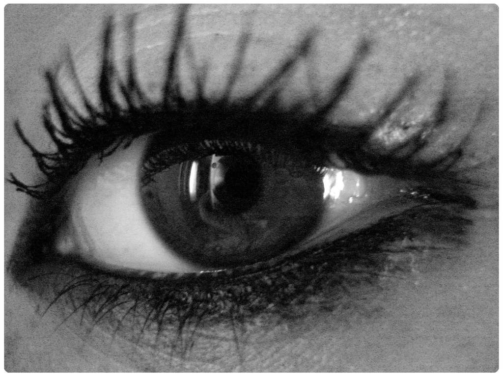 Eye shot